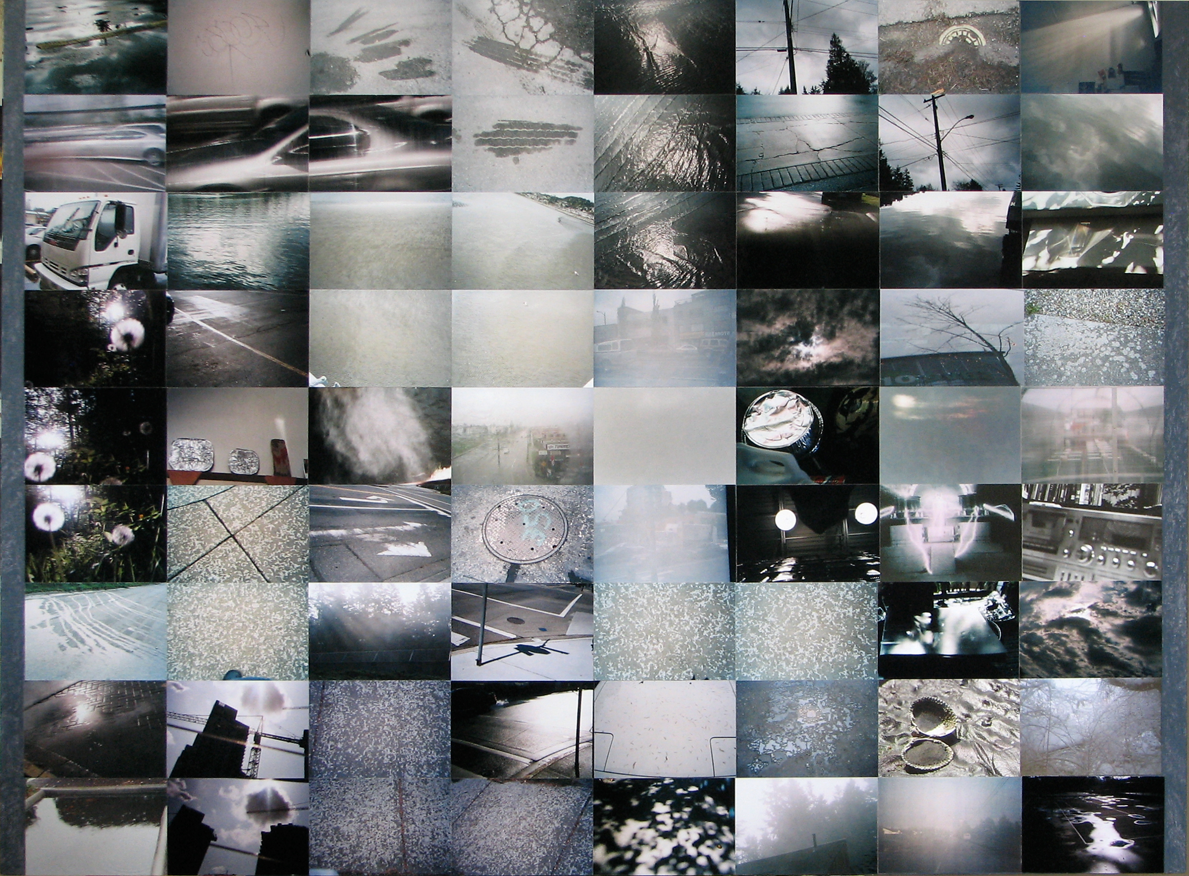 photo-collage, 92 x 127 cm